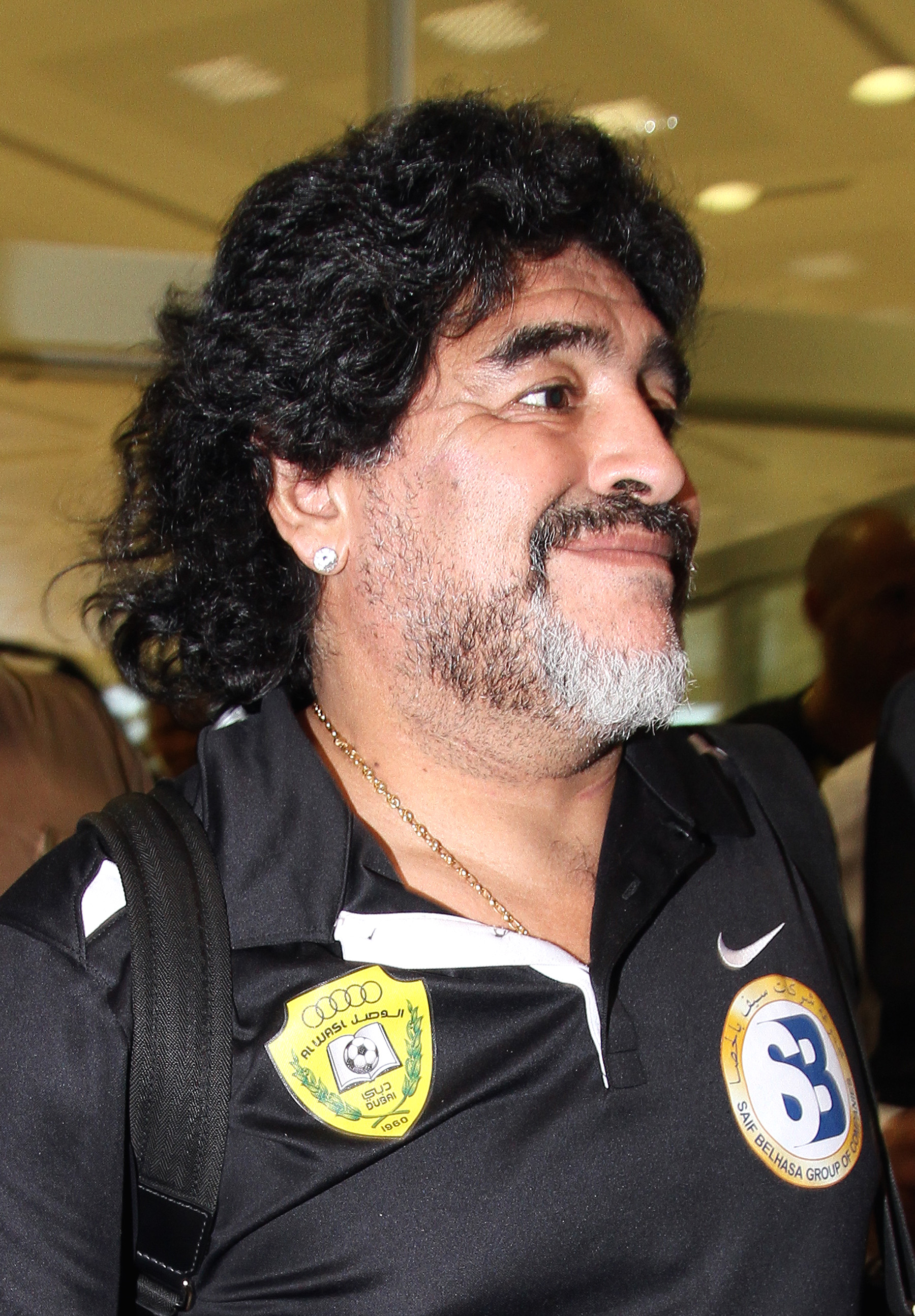 Диего Марадона